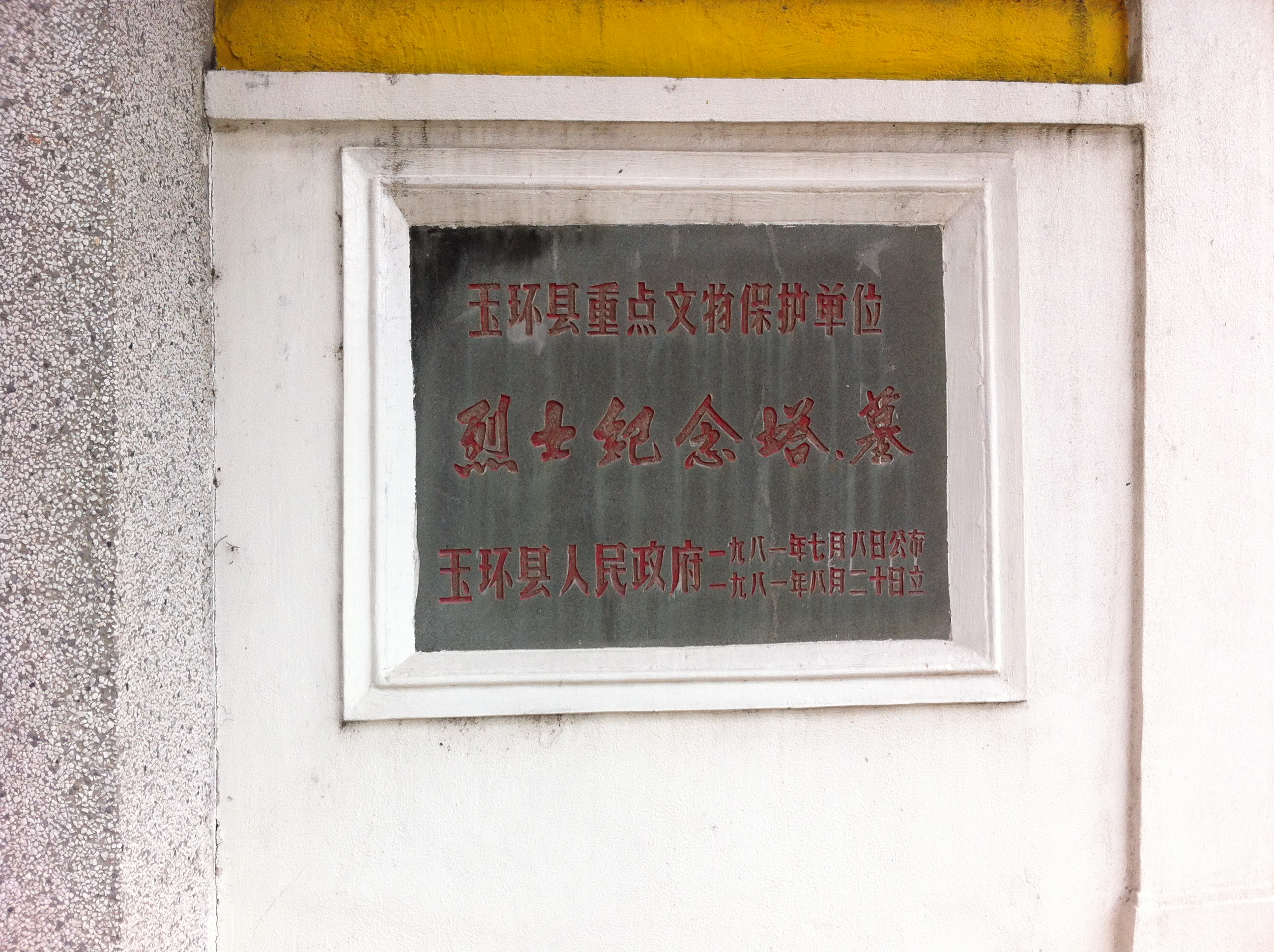 中文（中国大陆）: 玉环市烈士陵园中的玉环市文物保护单位文保碑